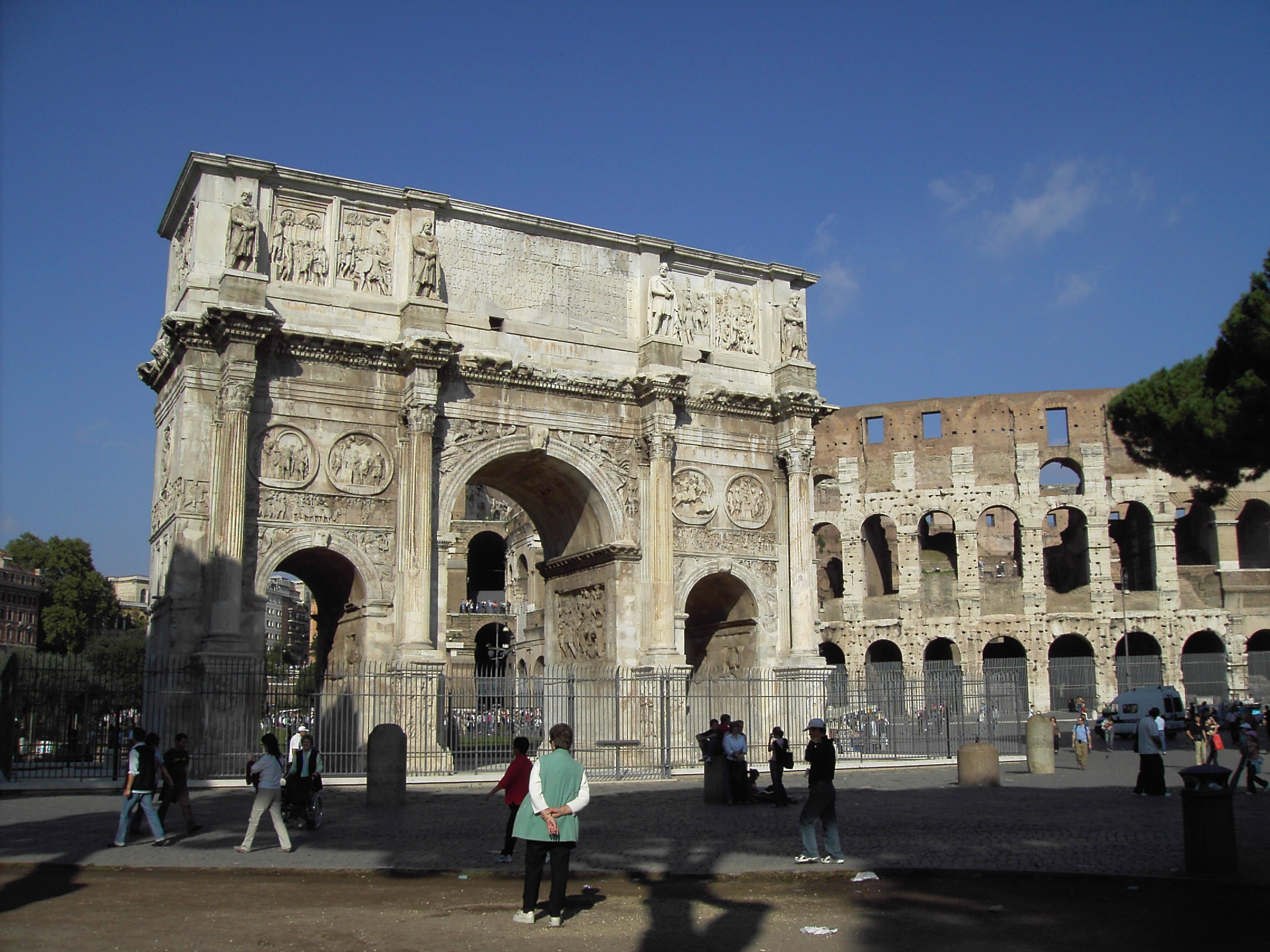 Roma, Arco di Costantino e Colosseo.